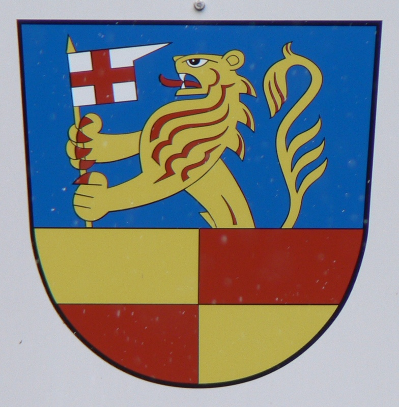 Znak Libiny (u vjezdu do obce)